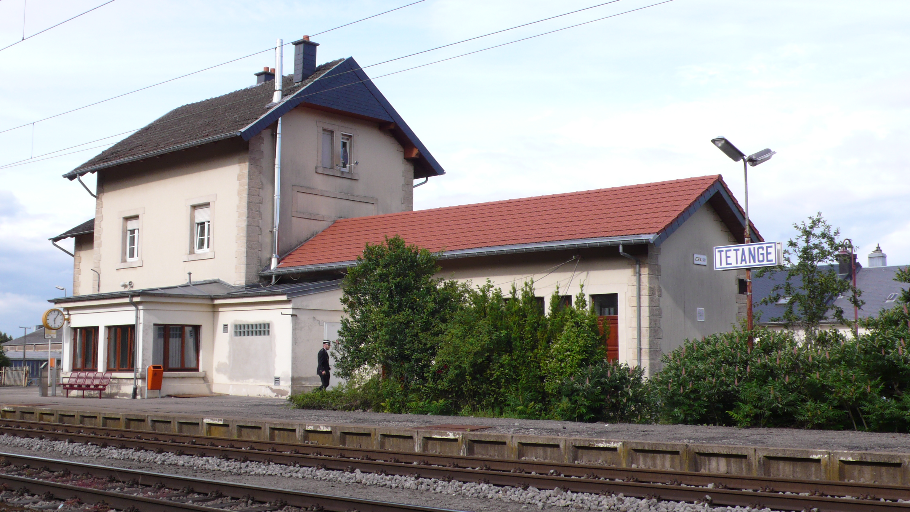 Gare Téiteng